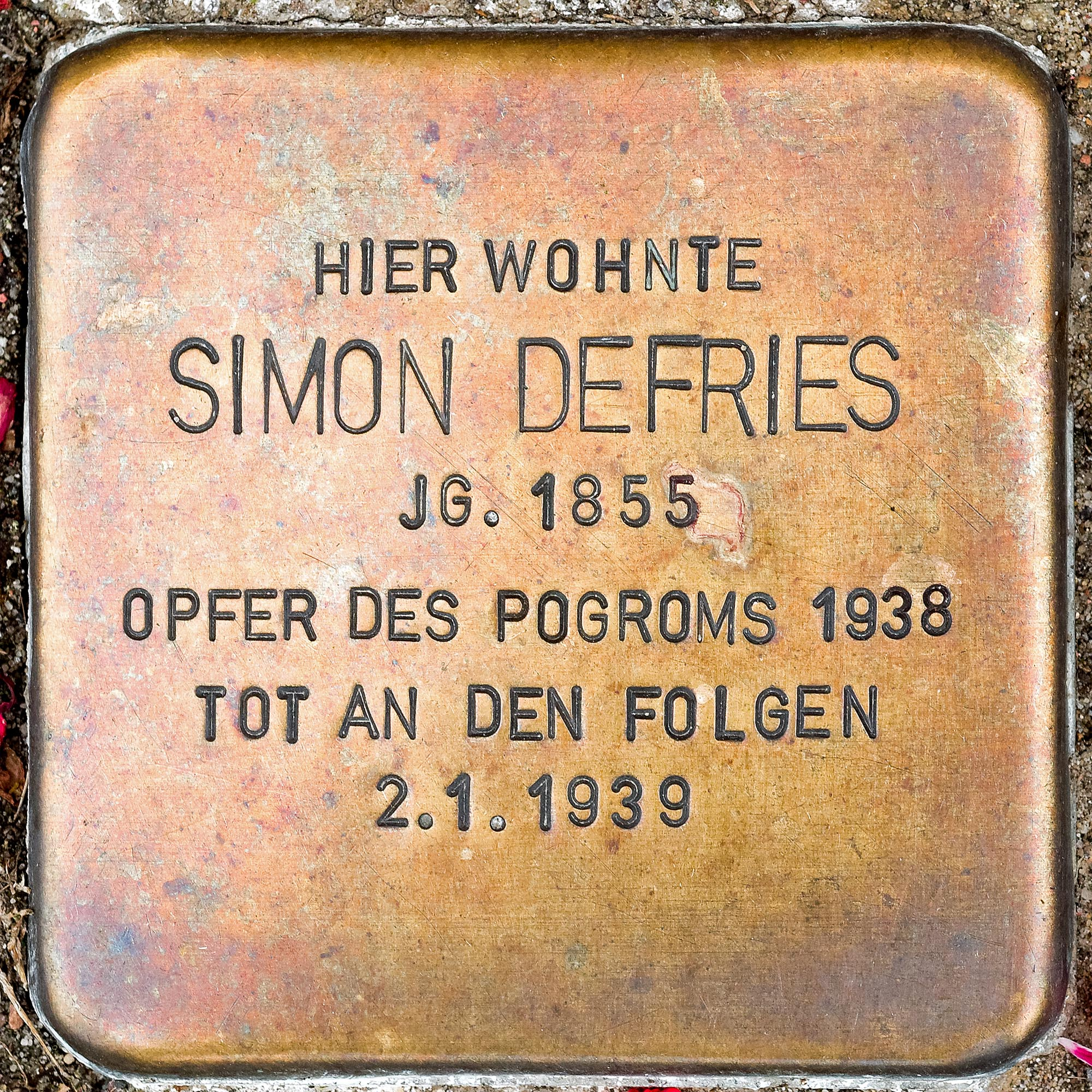 Stolperstein Defries, Simon